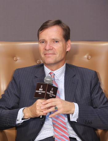 Peter Stas